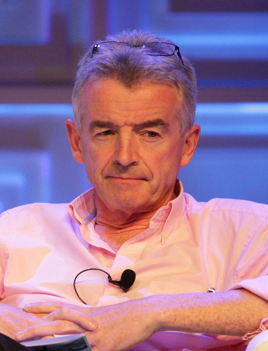 WTTC Global Summit 2015